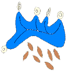 Escudo del Municipio de Chapantongo